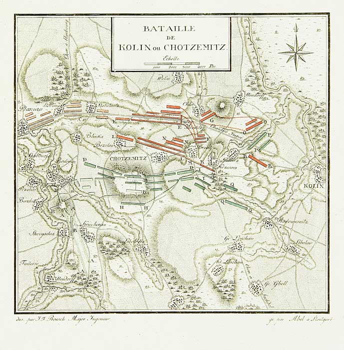 План битвы при Колине